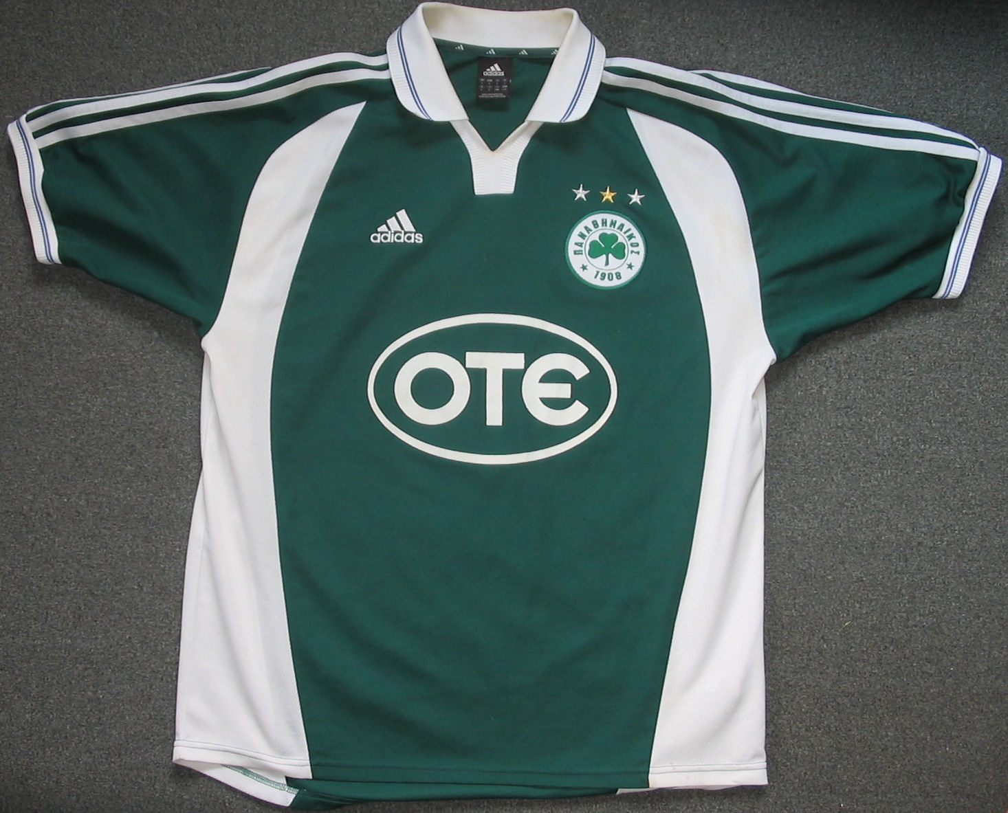 Fußballtrikot von Panathinaikos Athen aus der Saison 2002/2003